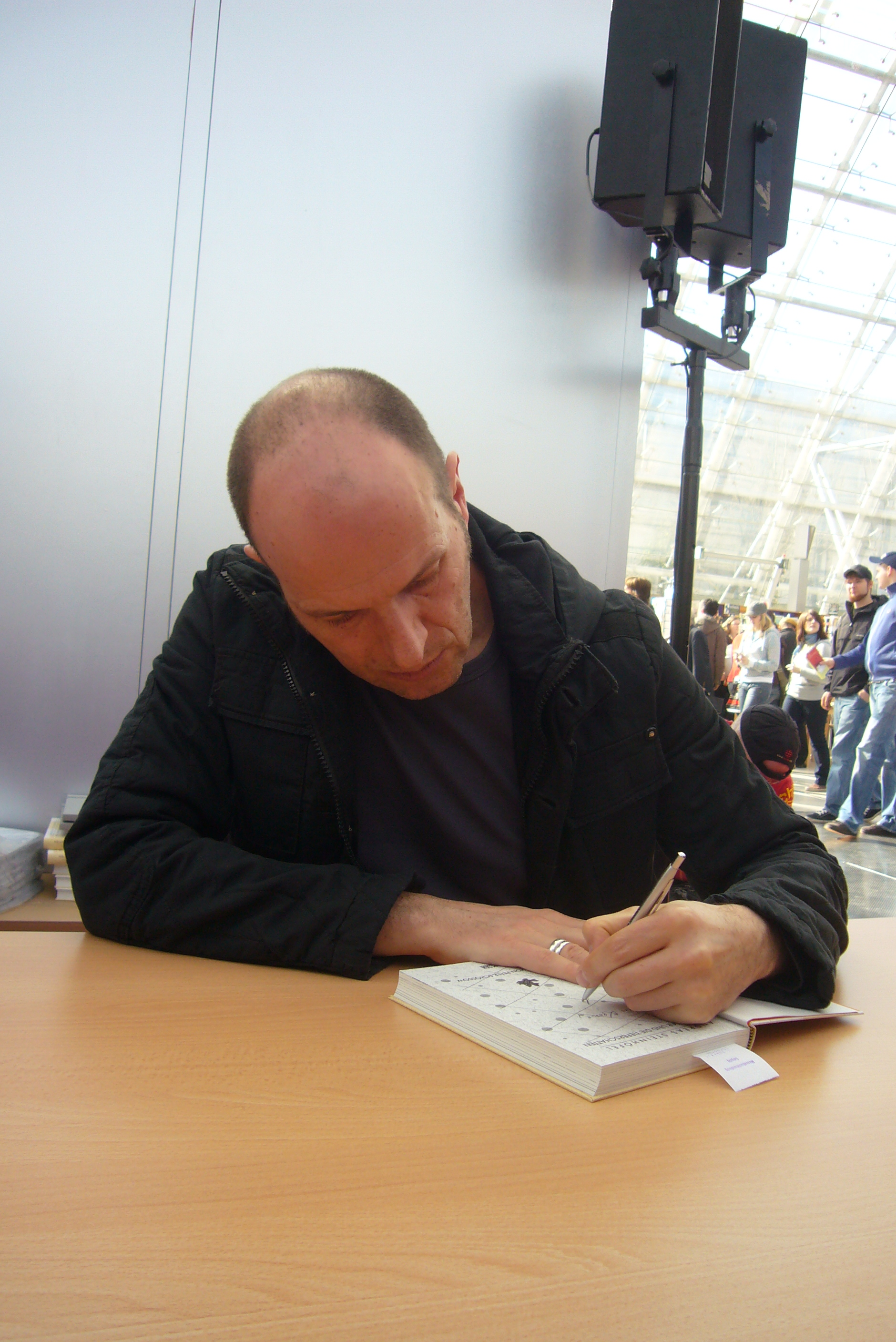 Nur für redaktionelle Nutzung / Editorial use only. Dieses Foto dürfen Sie honorarfrei nutzen, wenn Sie folgenden credit beachten: Copyright: Das blaue Sofa / Club Bertelsmann. Andreas Steinhöfel, 1962 in Battenberg geboren, arbeitet als Übersetzer und Rezensent, schreibt Drehbücher und ist Autor zahlreicher, vielfach preisgekrönter Kinder- und Jugendbücher. Sein Buch "Die Mitte der Welt" wurde 1999 für den Deutschen Jugendliteraturpreis nominiert und ist mittlerweile in vielen Ländern der Welt erschienen. 2009 bekam Steinhöfel 2009 den Erich Kästner Preis für Literatur verliehen. 2009 wurde sein Buch "Rico, Oskar und die Tieferschatten" ausgezeichnet u. a. mit dem Deutschen Jugendliteraturpreis, dem Katholischen Kinder- und Jugendbuchpreis und dem "Lesekünstler 2009".